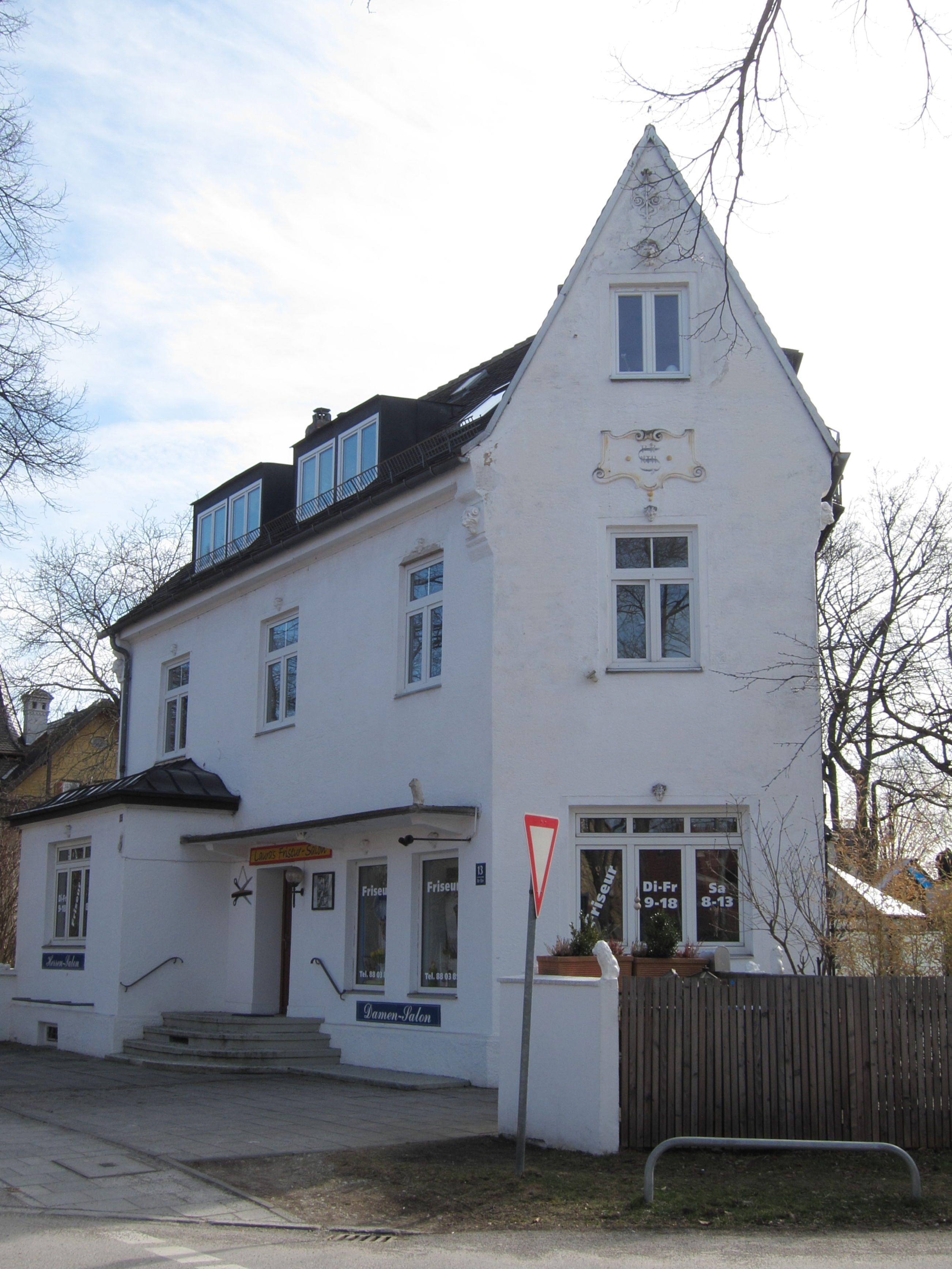 Alte Allee 13; Malerisches Eckhaus, 1900–01 von Johann Schalk.